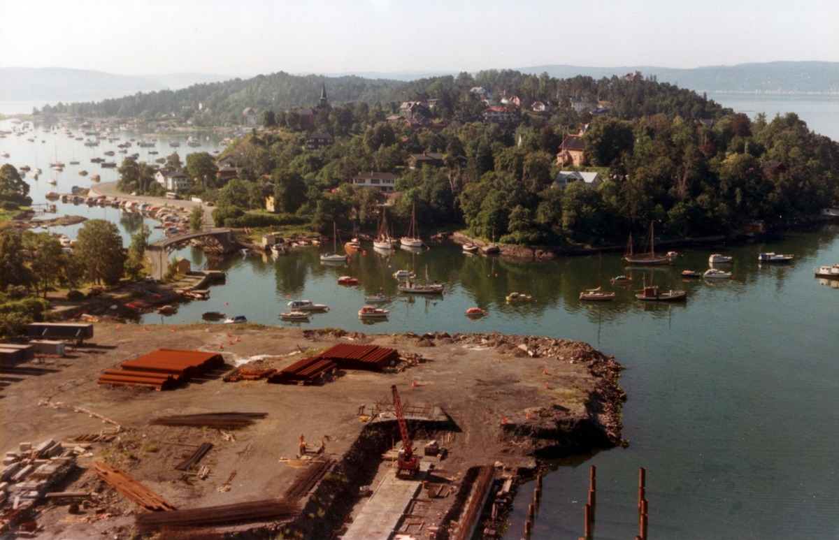 Ormsundet, med bygging av Ormsundkaia i forgrunnen, ca. 1985. Ormøya bak.